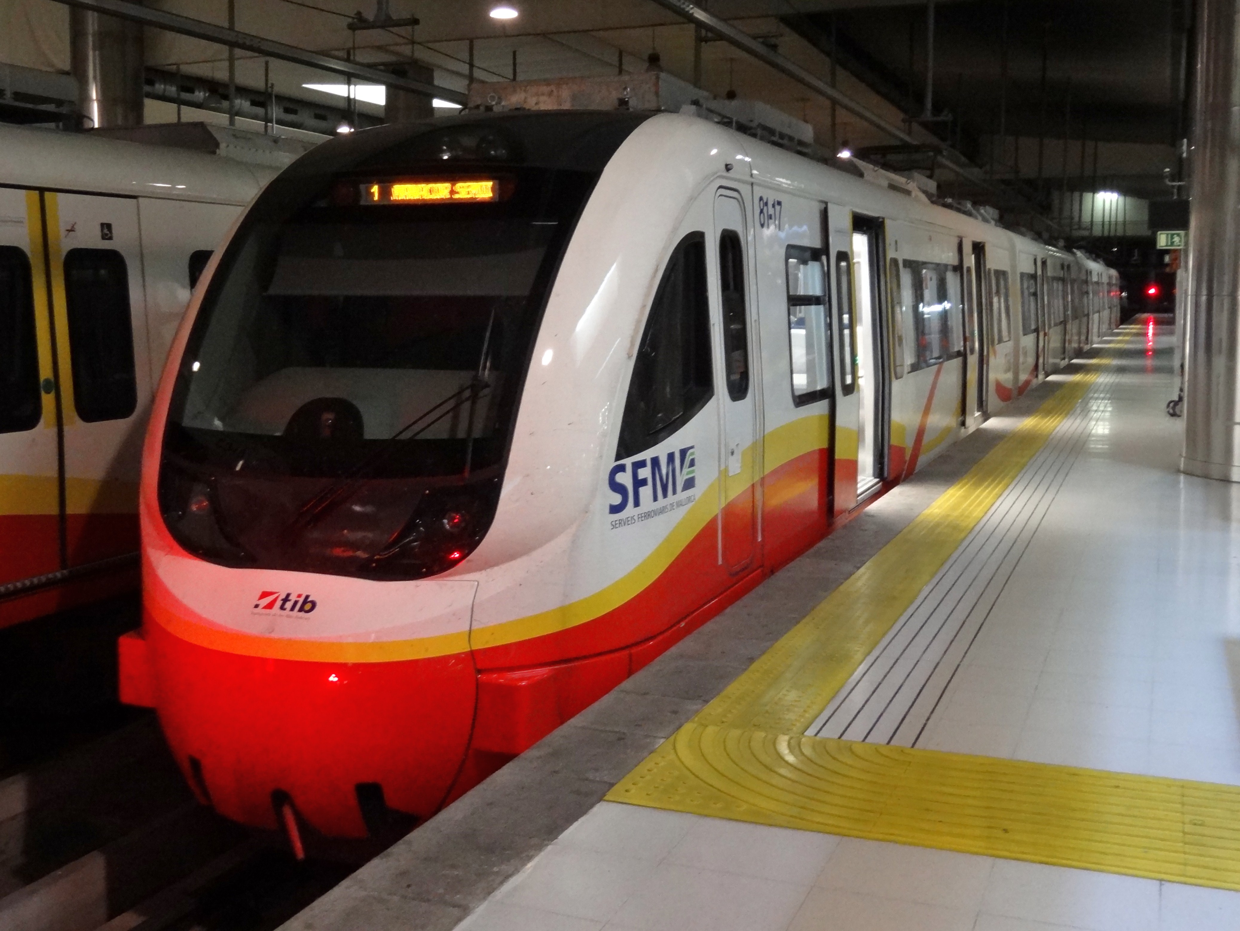 Estació Intermodal an der Plaça de Espanya in Palma, Mallorca, Spanien